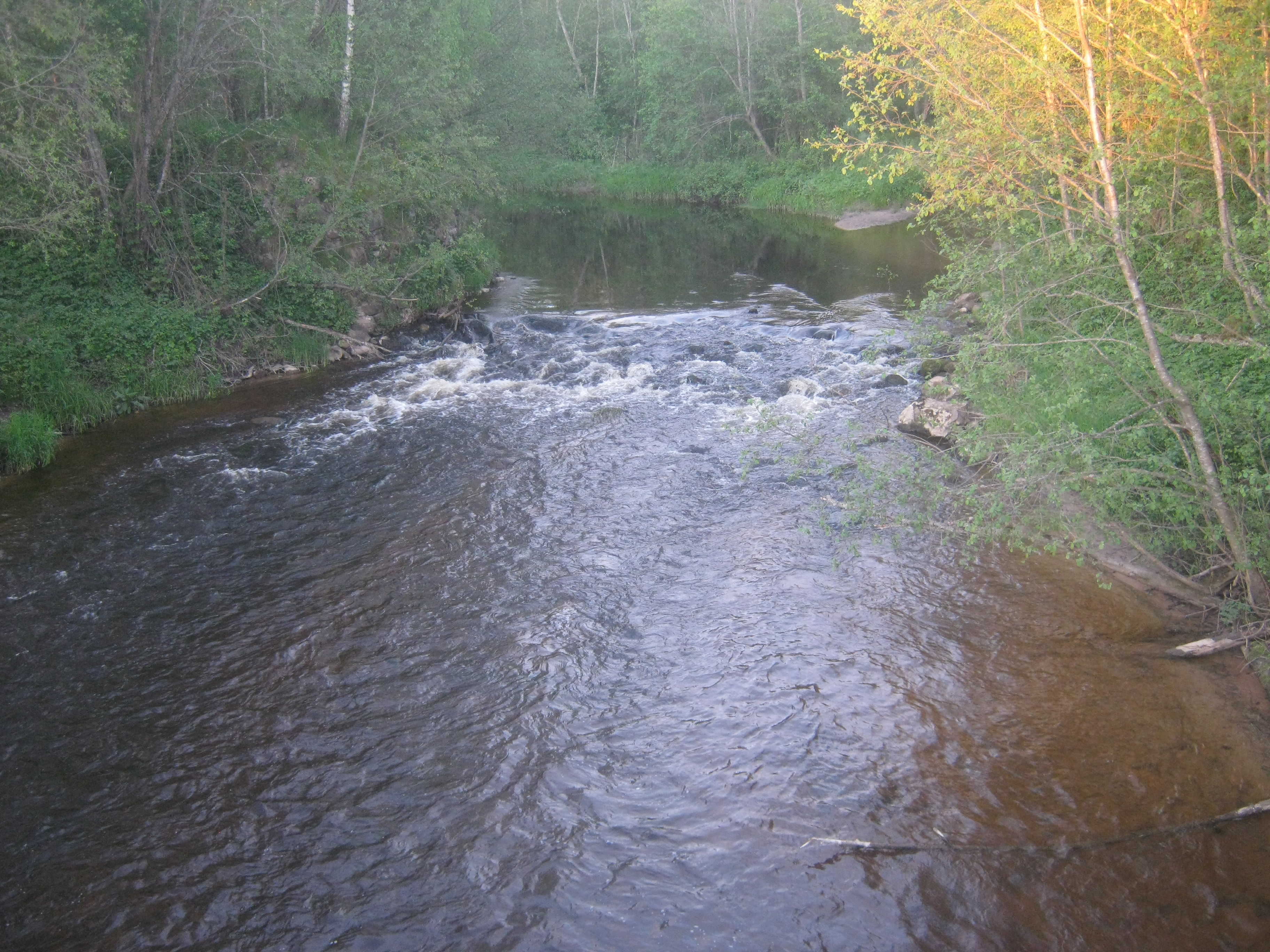 Река Сережа